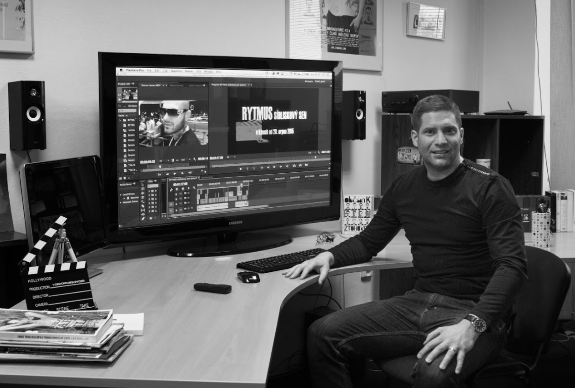 Michal Romeo Dvořák